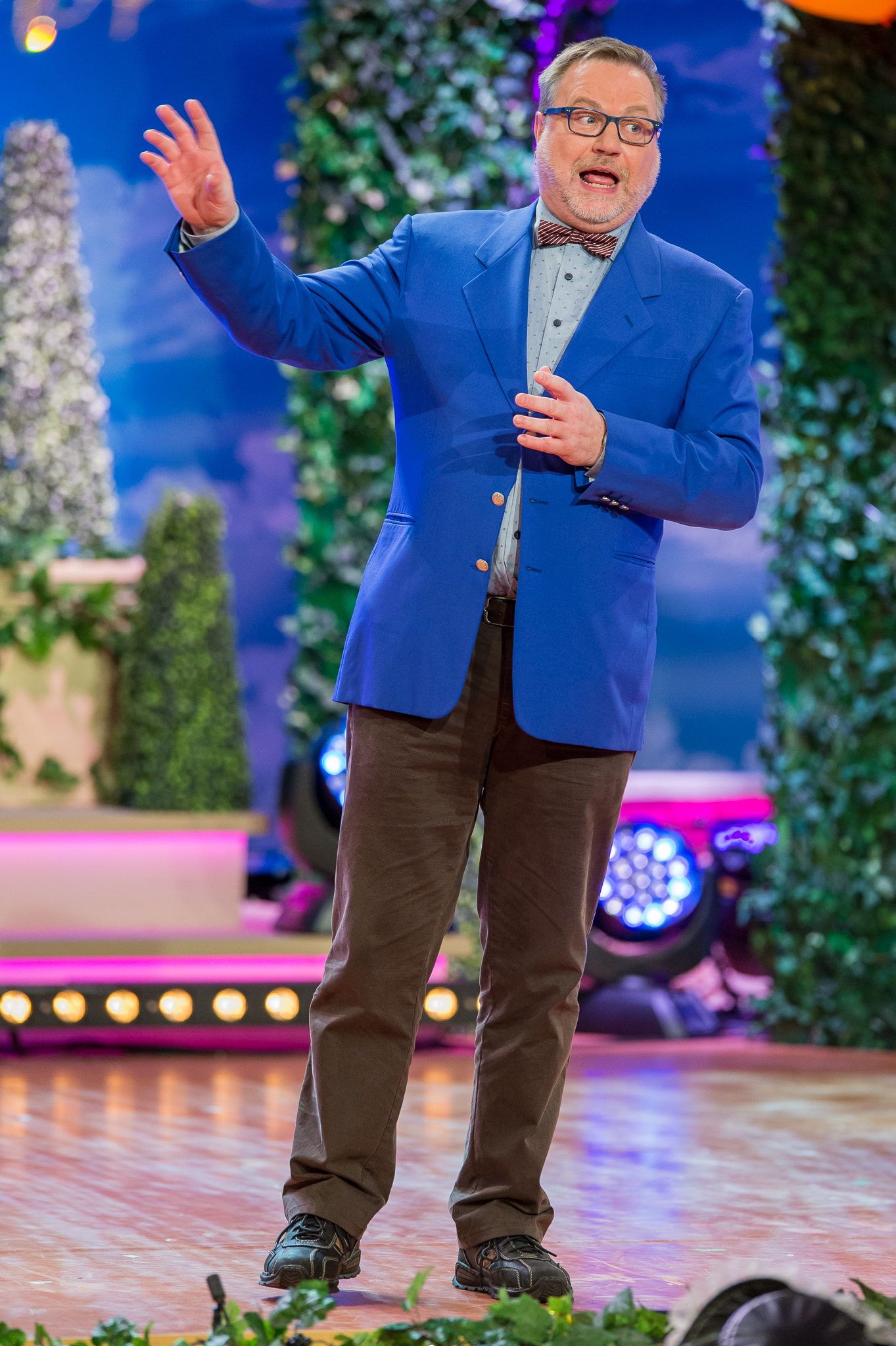 BR,Bayerisches Fernsehen,Fastnacht in Franken,Fastnachts-Verband Franken,Karneval,Live-Sendung,Mainfrankensäle,Peter Kuhn